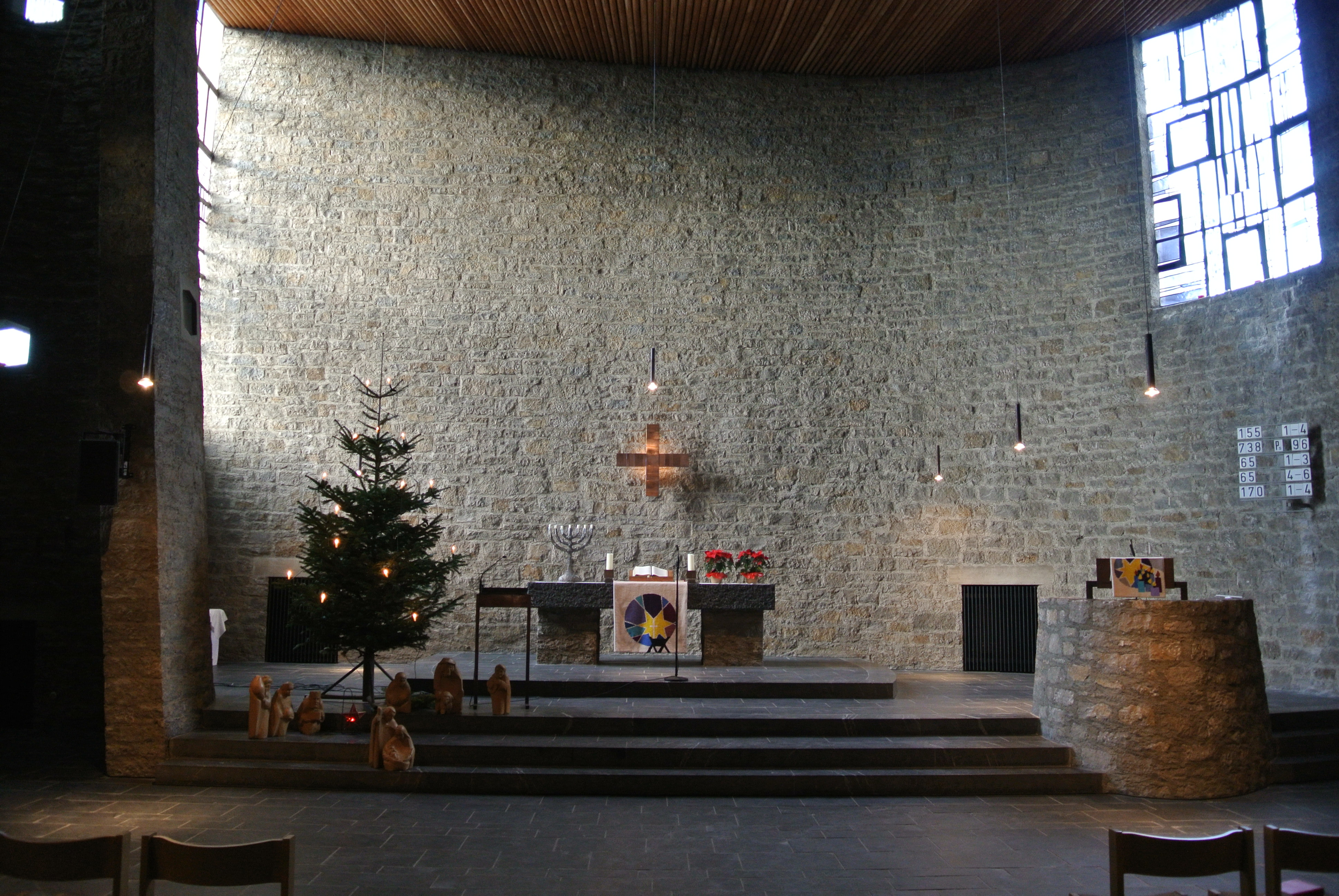 Dreifaltigkeitskirche in Frankfurt-Bockenheim-Kuhwaldsiedlung, Architekt: Werner Neumann, 1966 eingeweiht, Innenraum, Altarwand